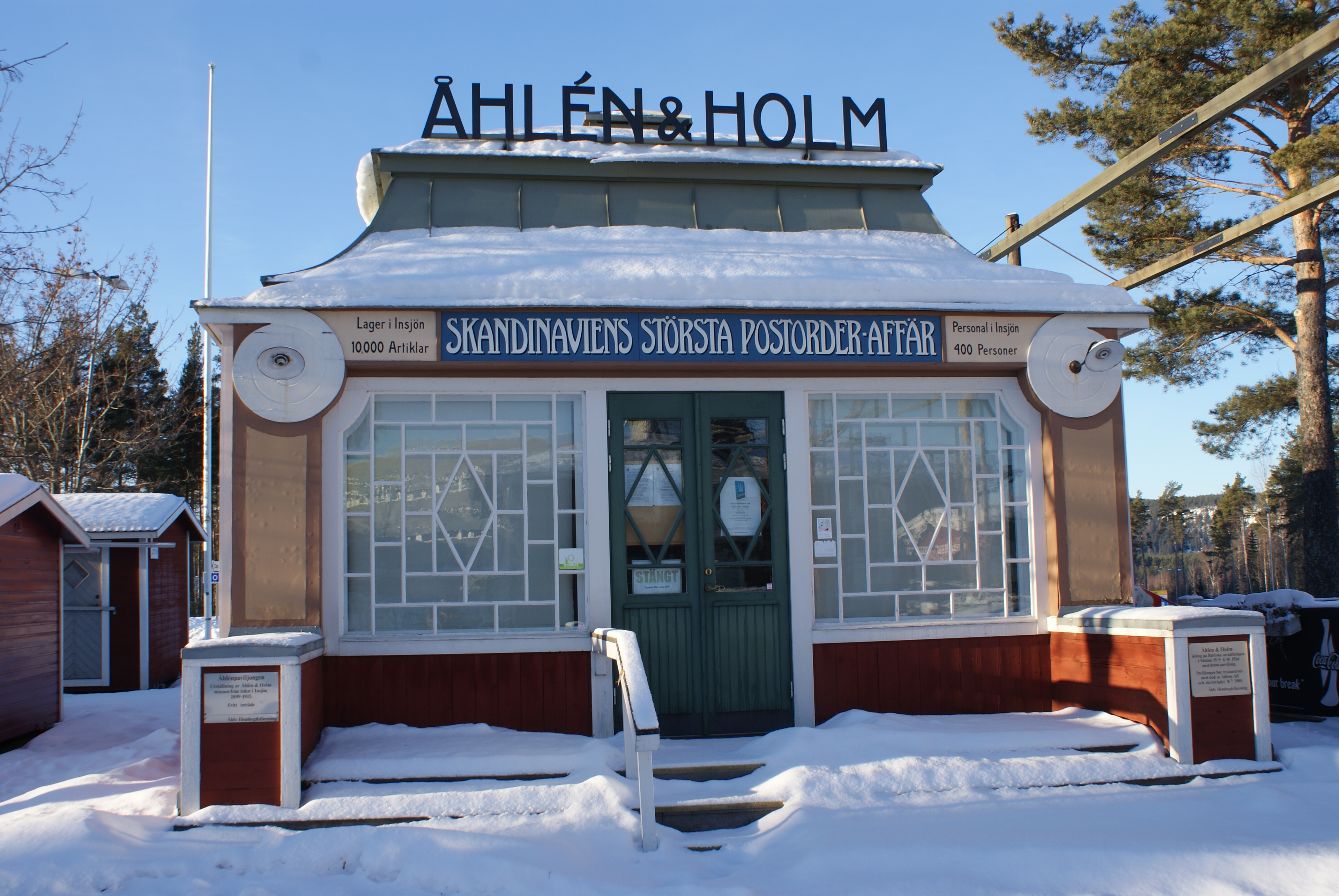 Åhlen & Holms paviljong som användes på den Baltiska utställningen i Malmö.